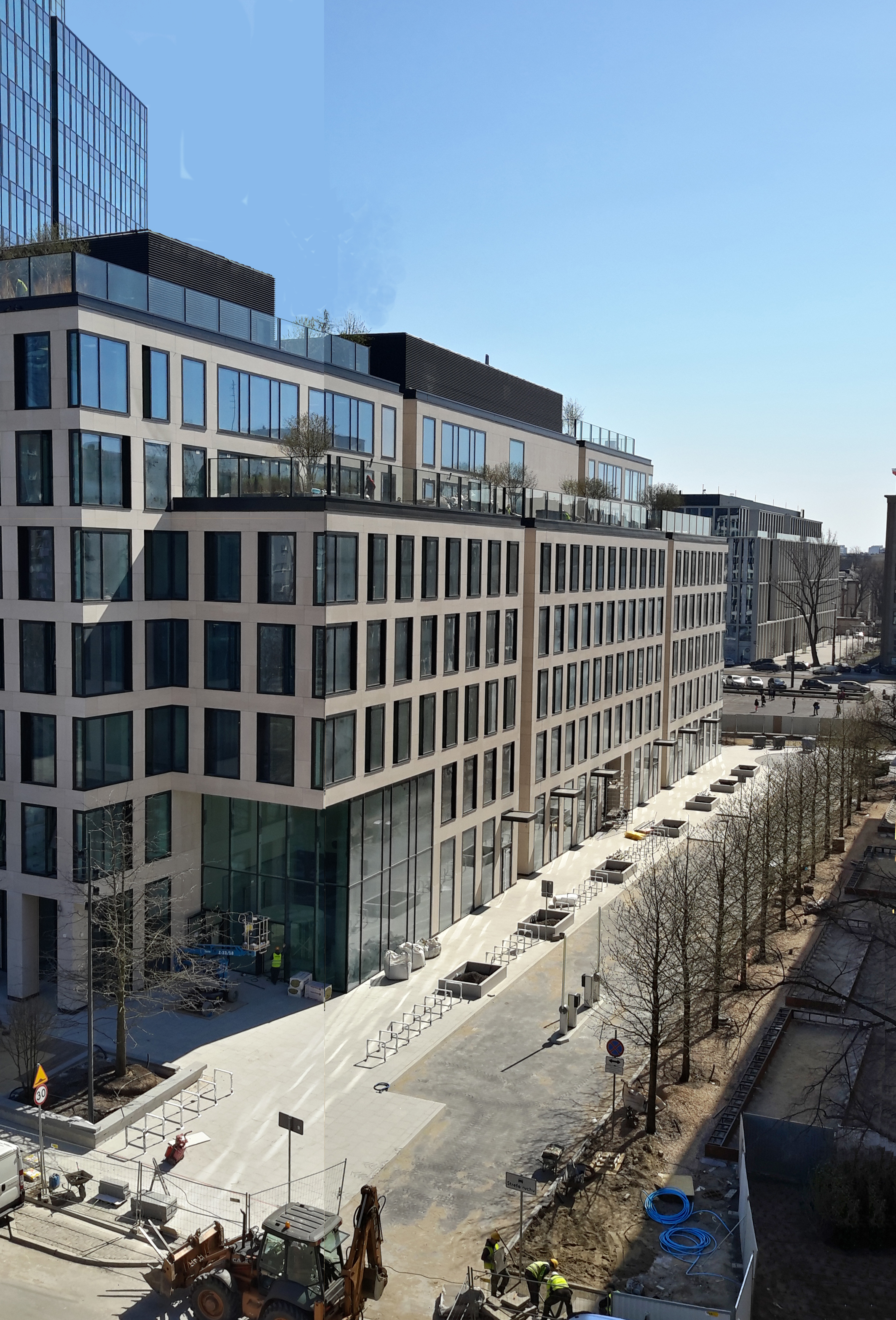 Plac budowy - widok od ulicy Chmielnej w stronę Alej Jerozolimskich